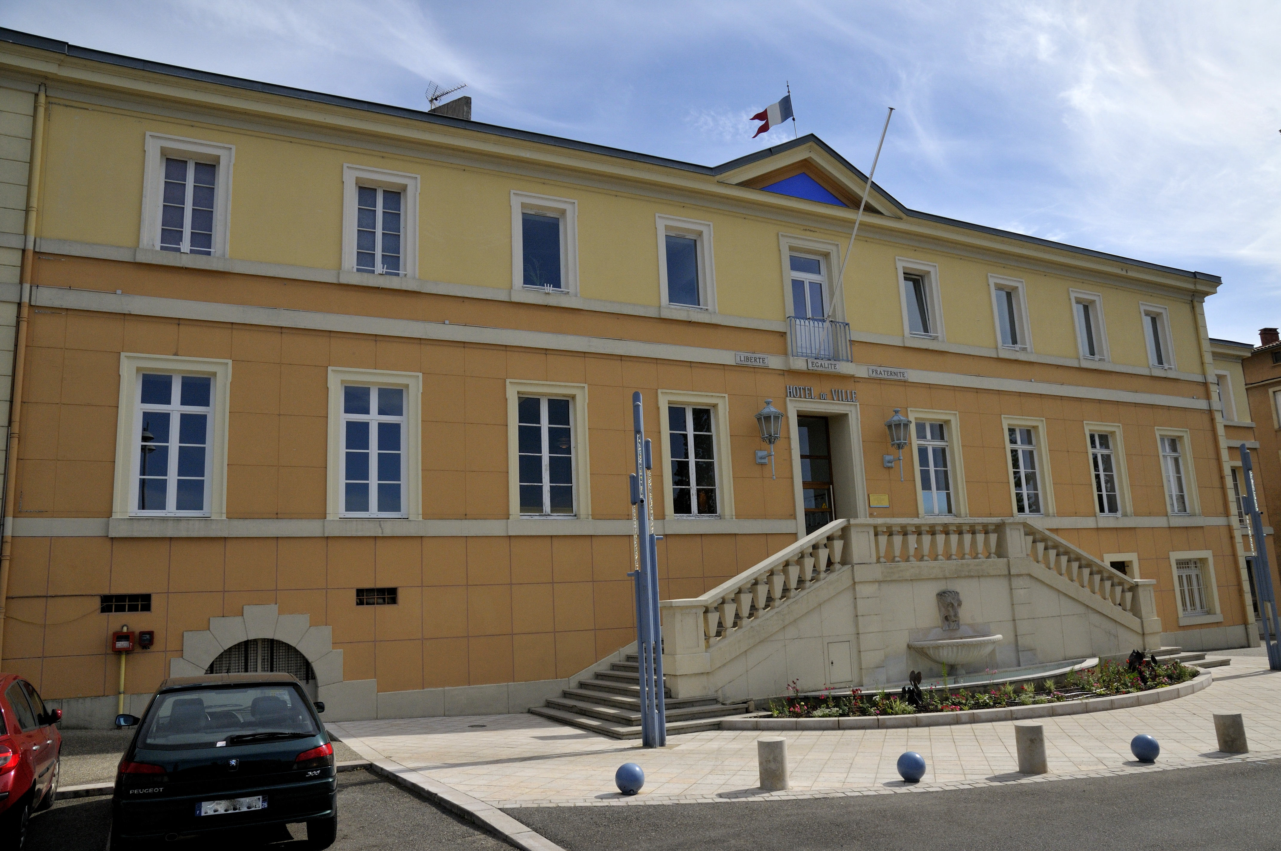 l'hôtel de ville